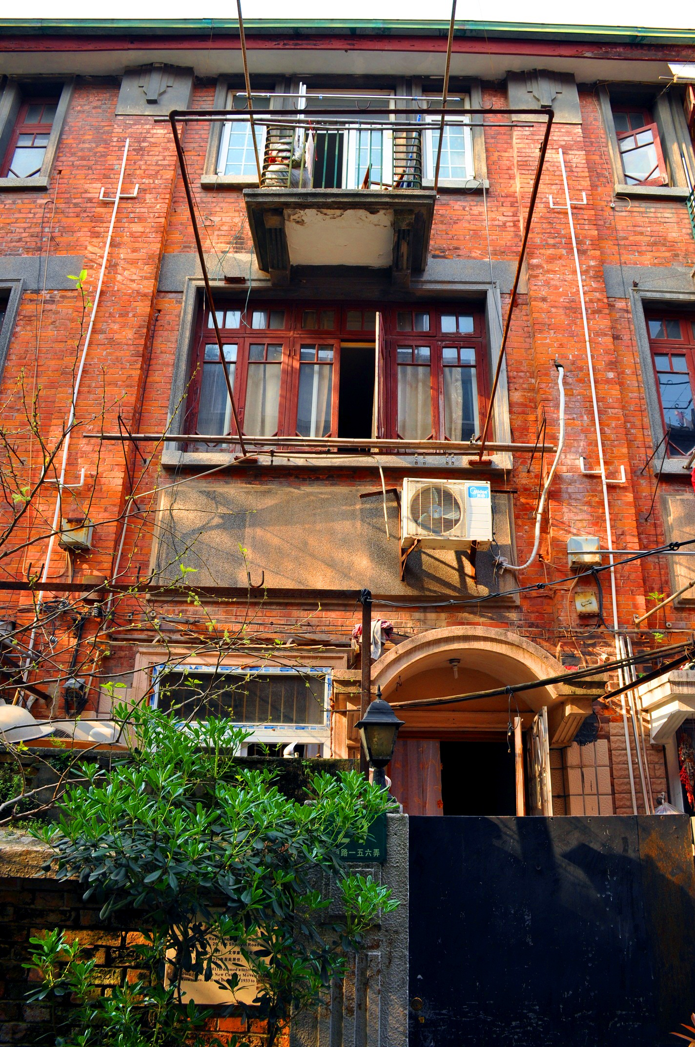 茅盾山阴路156路旧居 山阴路156弄29号